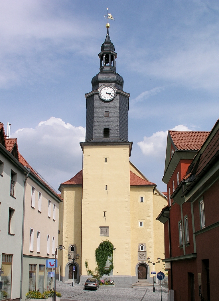 Das Bild zeigt die Stadtkirche St. Jakobus in Ilmenau